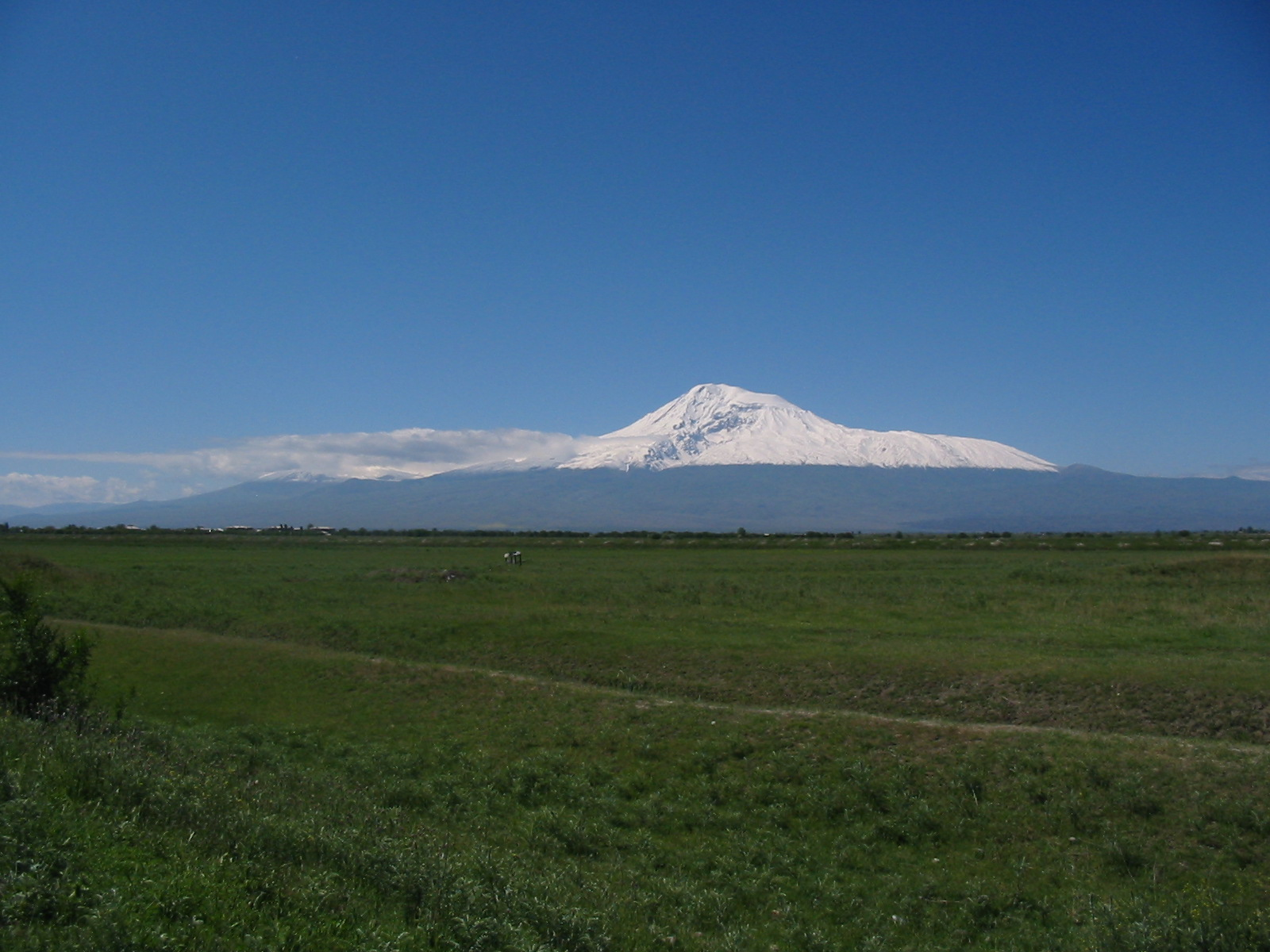 Ararat et Massis dans la brume